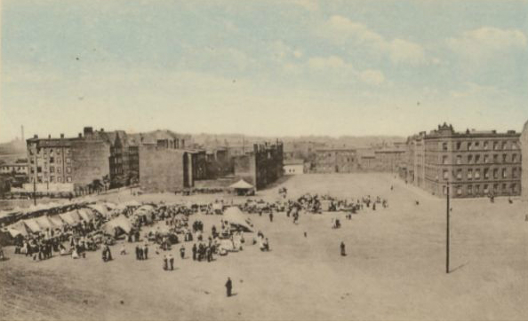 Targowisko pomiędzy dzisiejszymi ulicami Farna i Wrocławska w Chorzowie Batorym, 20-to lecie międzywojenne.